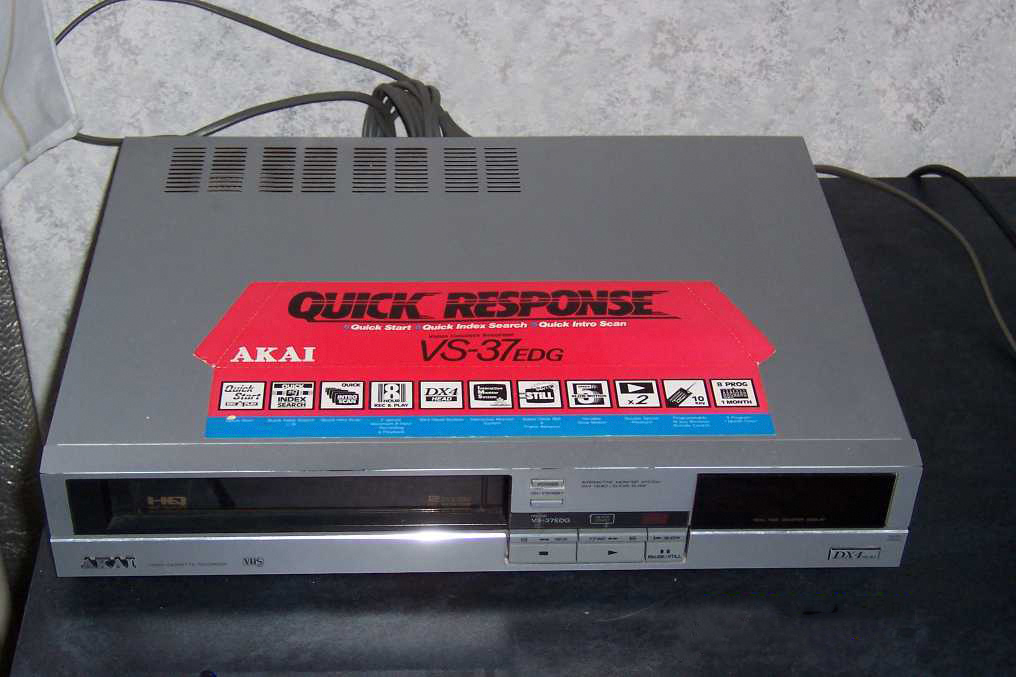 Akai VS-37EDG típusú videomagnetofon